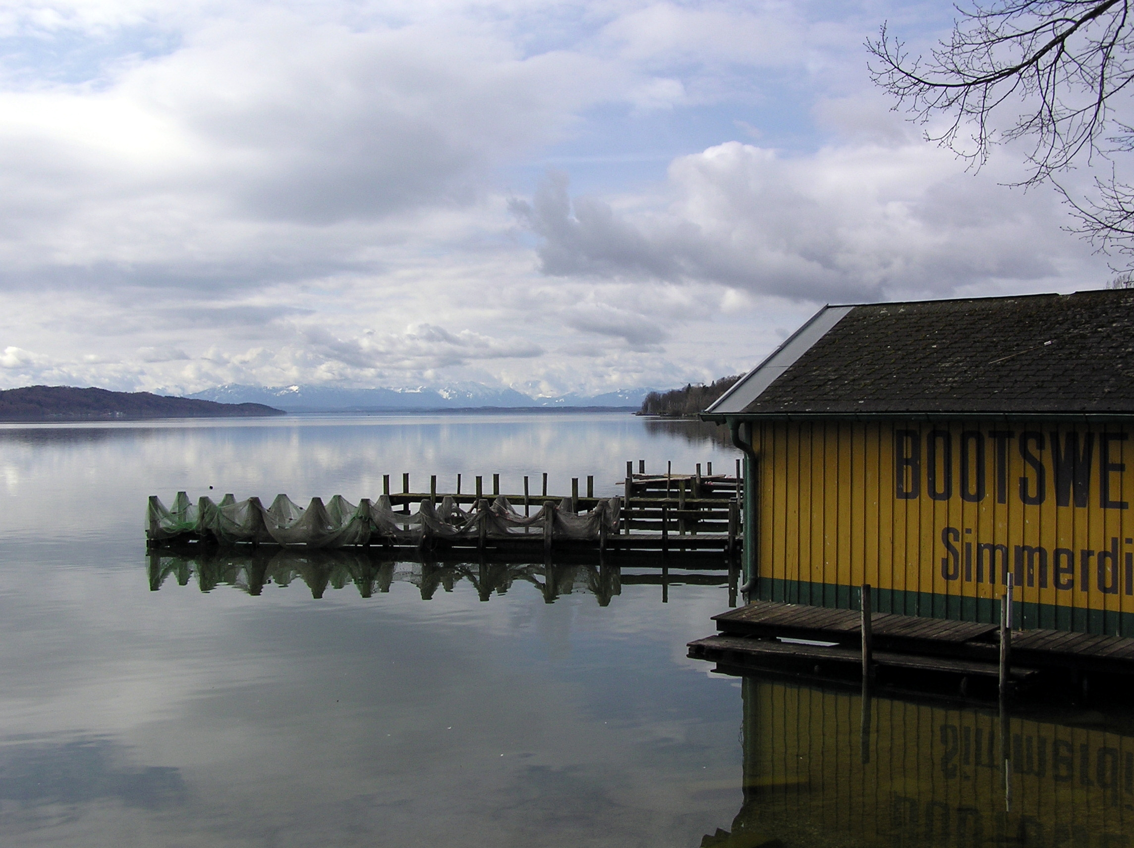 Starnberg, Bootshütte am Seeufer.